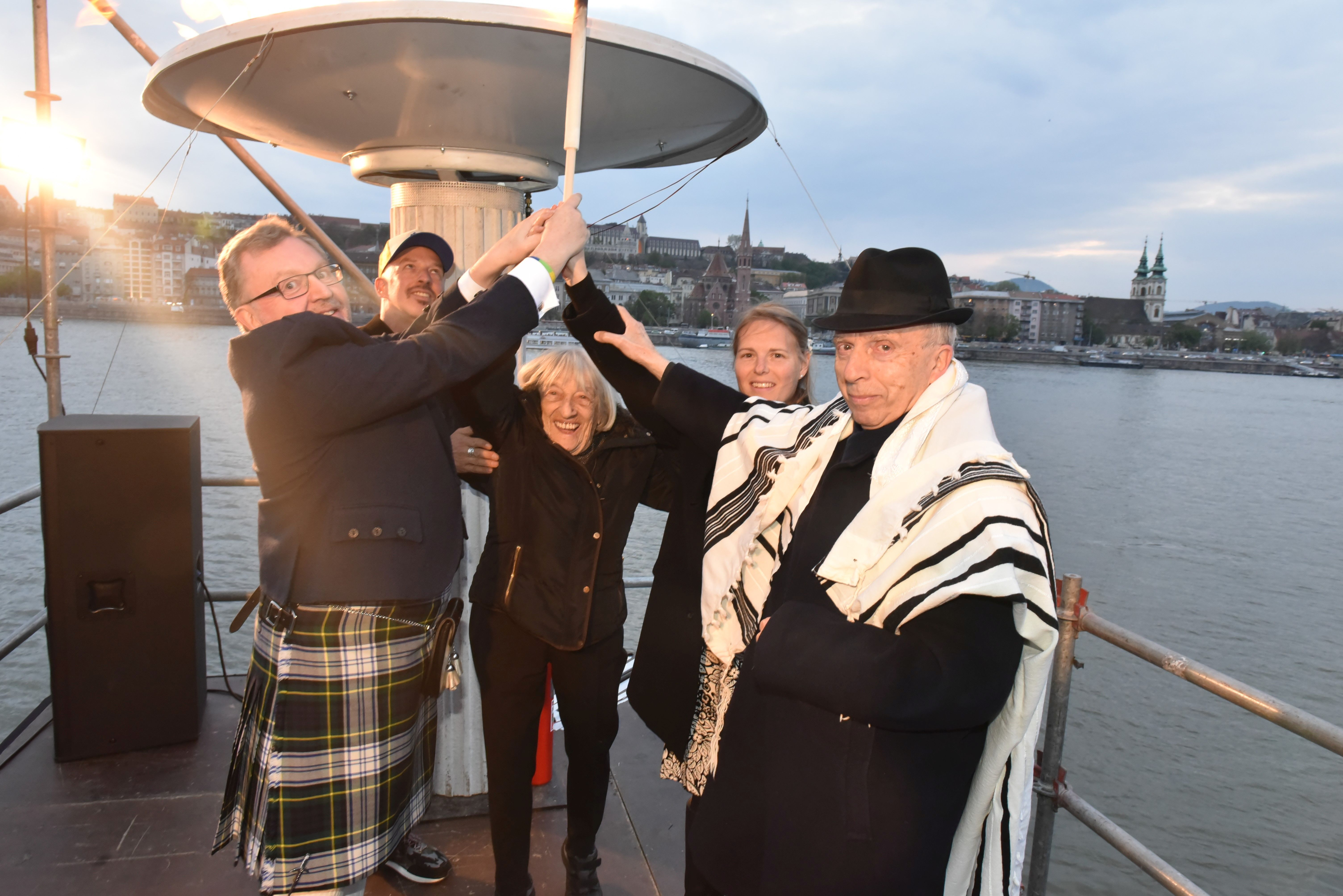 Keleti Ágnes az Élet menete elnevezésű fáklyás felvonuláson, jobbra Kardos Péter főrabbi